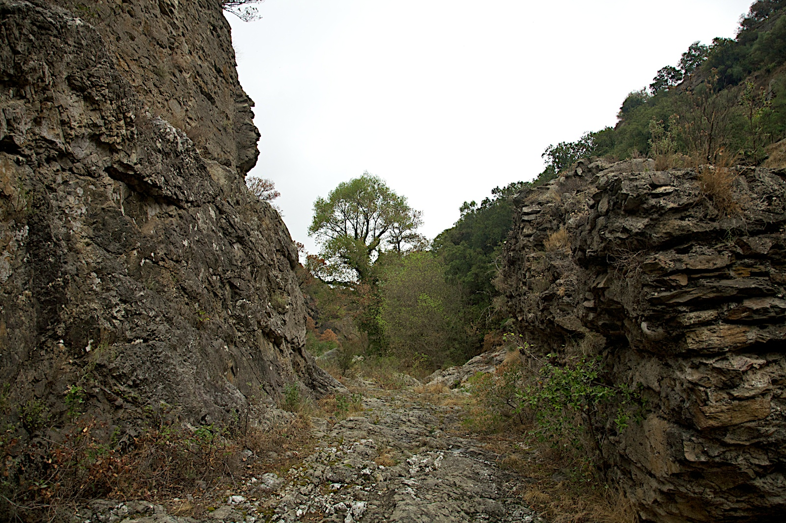 Roman road, La Cluse